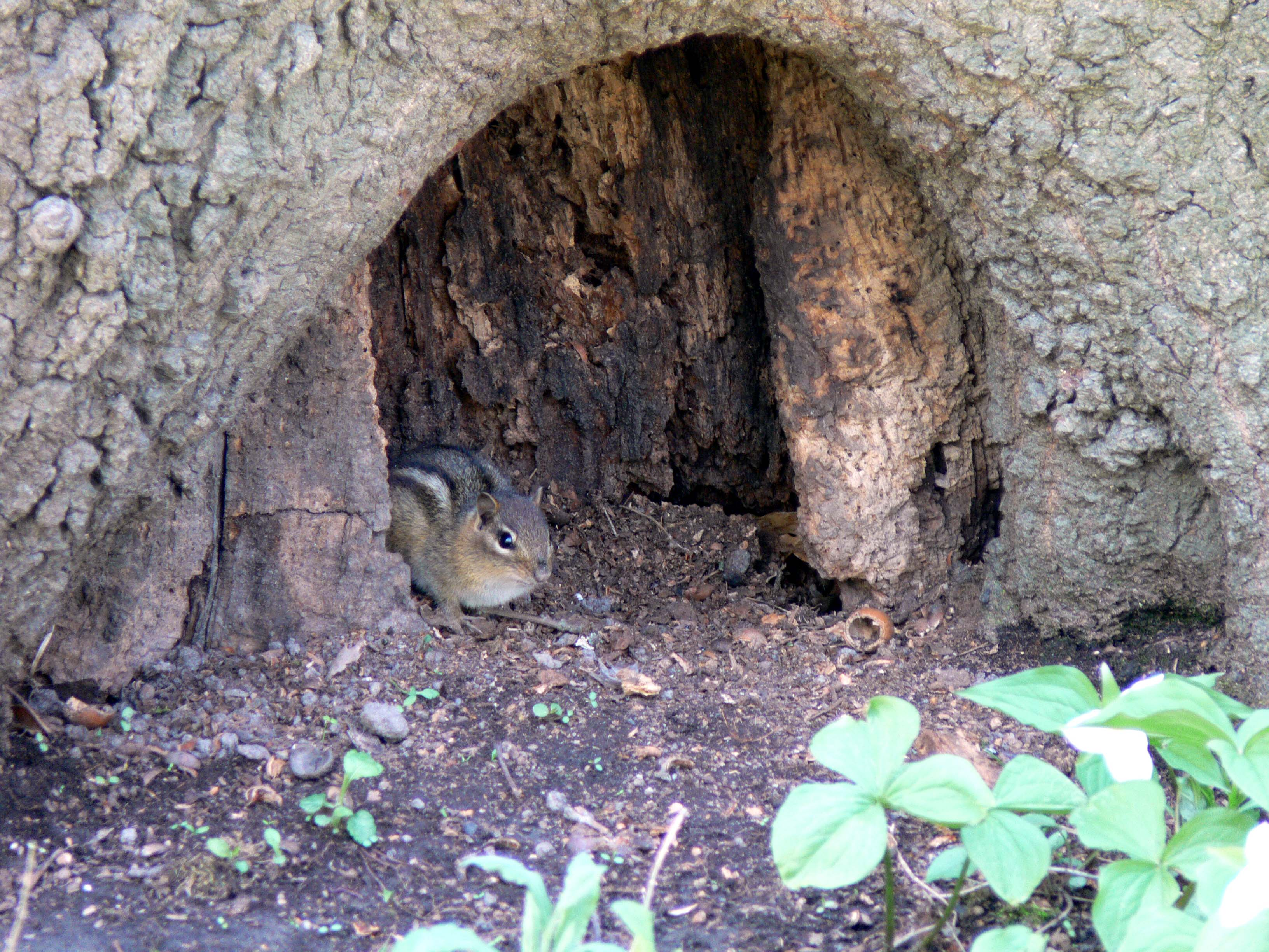 Chipmunk near Chicago Botanic Garden, Illinois